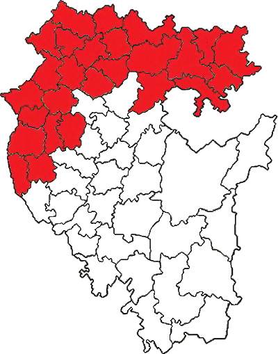 Нефтекамская епархия (карта)